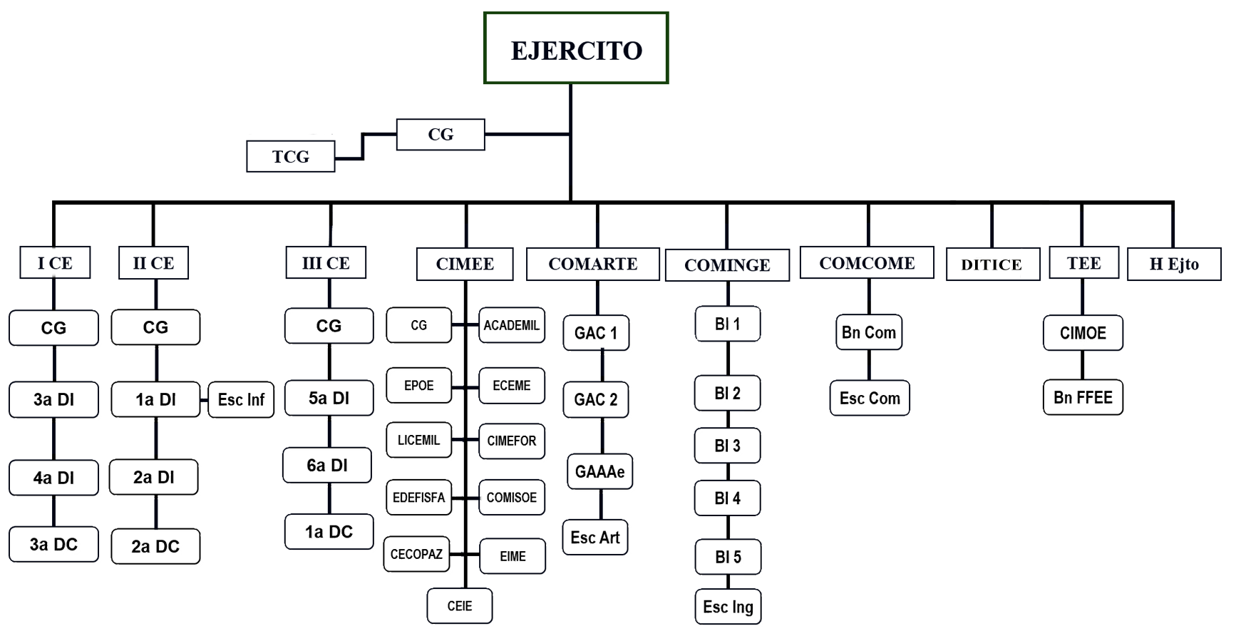 Organización